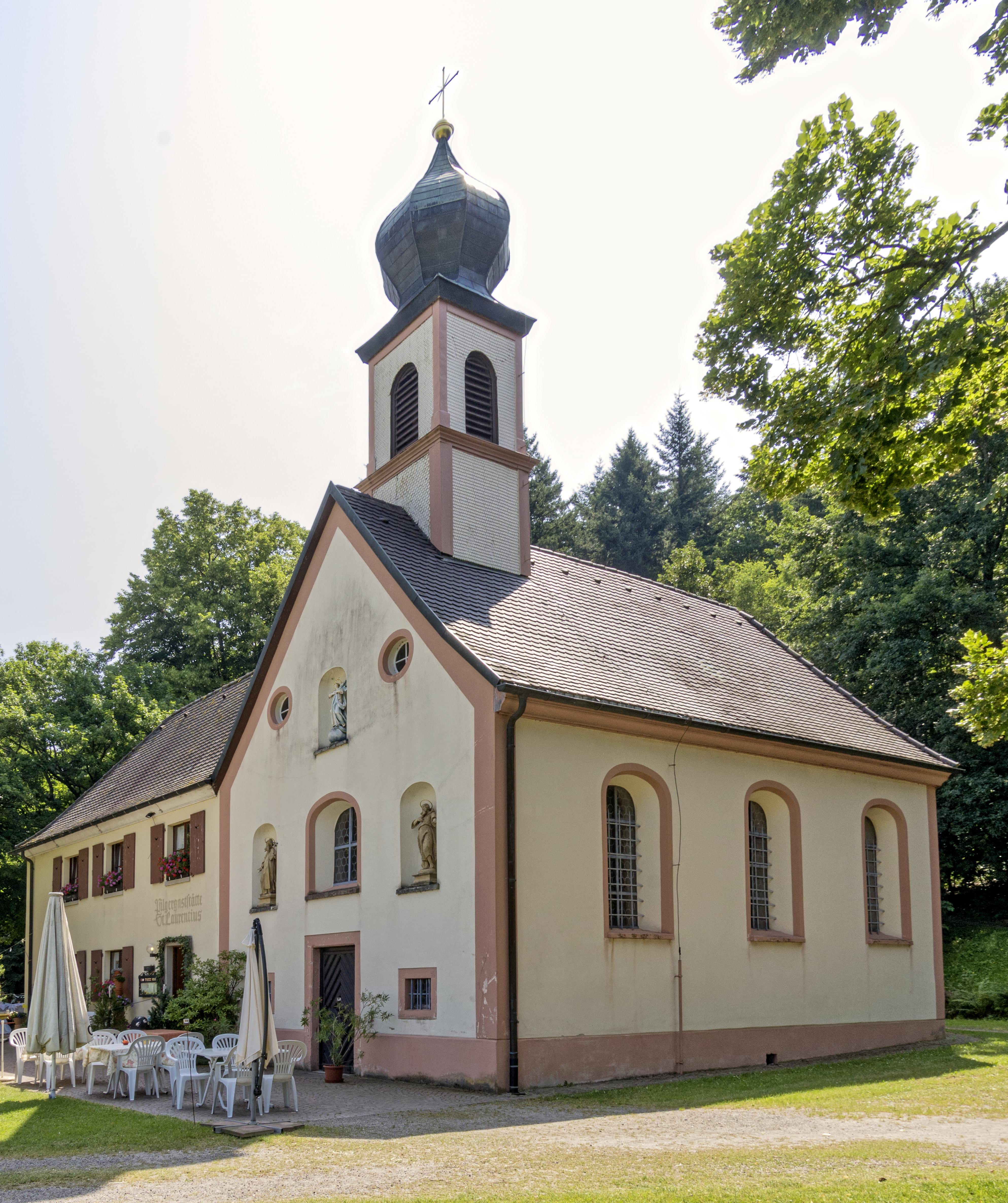 Bilder von der Giersbergkapelle